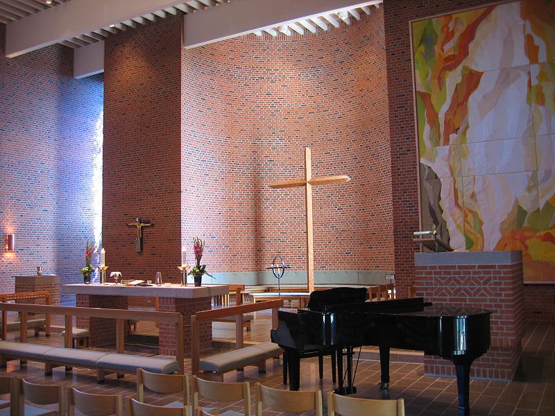 Inside Abildgaard Kirke